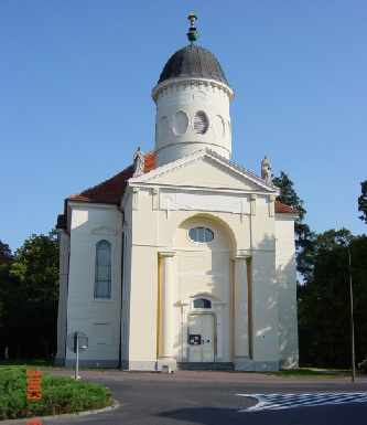 Evangelische Kirche Wartenberg